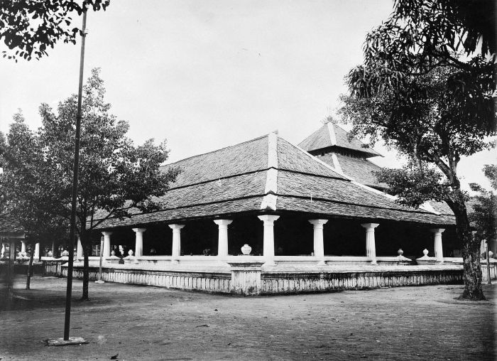 Foto. Masjid Ageng Karaton Surakarta, dari sisi timur laut.